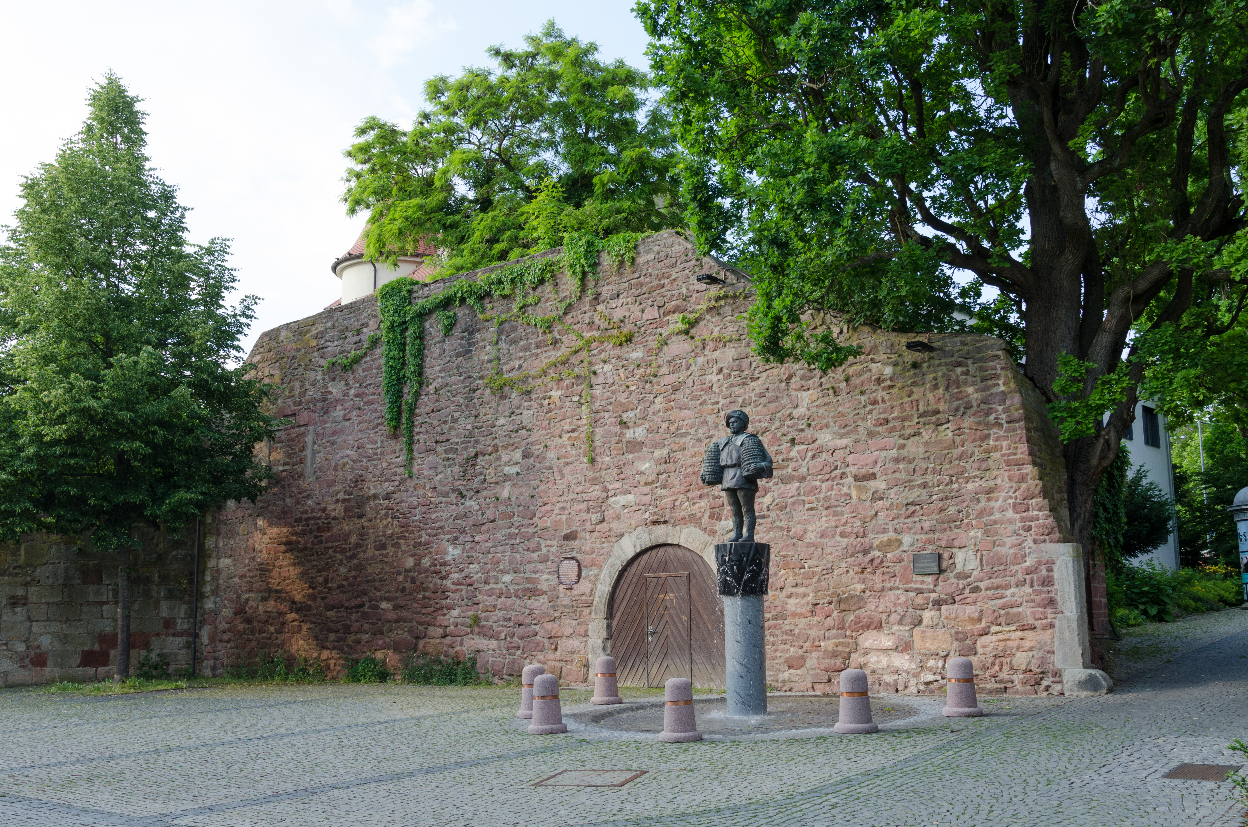 Bad Kissingen, Stadtmauer am Eisenstädter Platz